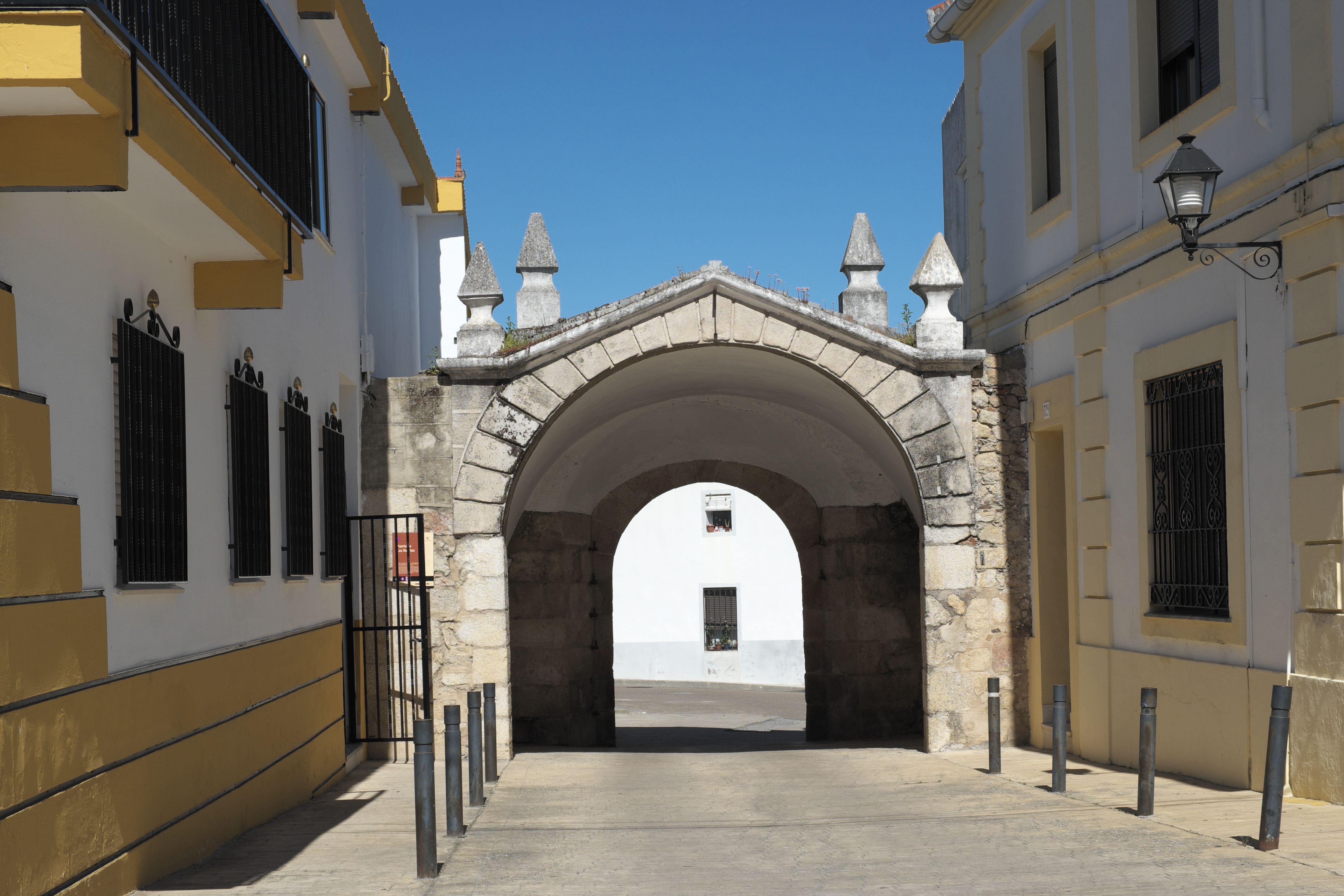 Barrio judío-gótico (Judenviertel) in Valencia de Alcántara in der Provinz Cáceres (Extremadura/Spanien), Stadttor Puerta de las Huertas